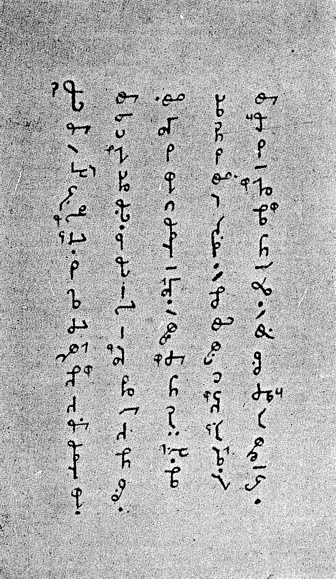 Eine Seite aus der Handschrift The Divine Prophecies of the Ten Sibyls („Die göttlichen Prophezeiungen der zehn Sibyllen“), von Jane Seager von 1589, gewidmet Elisabeth I., geschrieben in der Characterie von Timothy Bright. Umschrift (siehe unten) in frühneuenglischer Rechtschreibung, teilweise mit modernen Formen in Klammern. Zwei Schrägstriche markieren einen Spaltenwechsel im Stenogramm. In eckigen Klammern stehen die zur Bildung benutzten, teilweise punktierten, Zeichen mit den zur Bildung der neuen Wörter verwendeten Unterscheidungsbuchstaben in Hochstellung. Bei Wörtern, die durch mehrere Zeichen wiedergegeben sind, sind die Bestandteile durch Bindestriche getrennt. Abbildung und Umschrift entnommen aus Olof Werling Melin: Stenografiens historia 1. Teil. Nordiska bokhandeln. Stockholm 1927